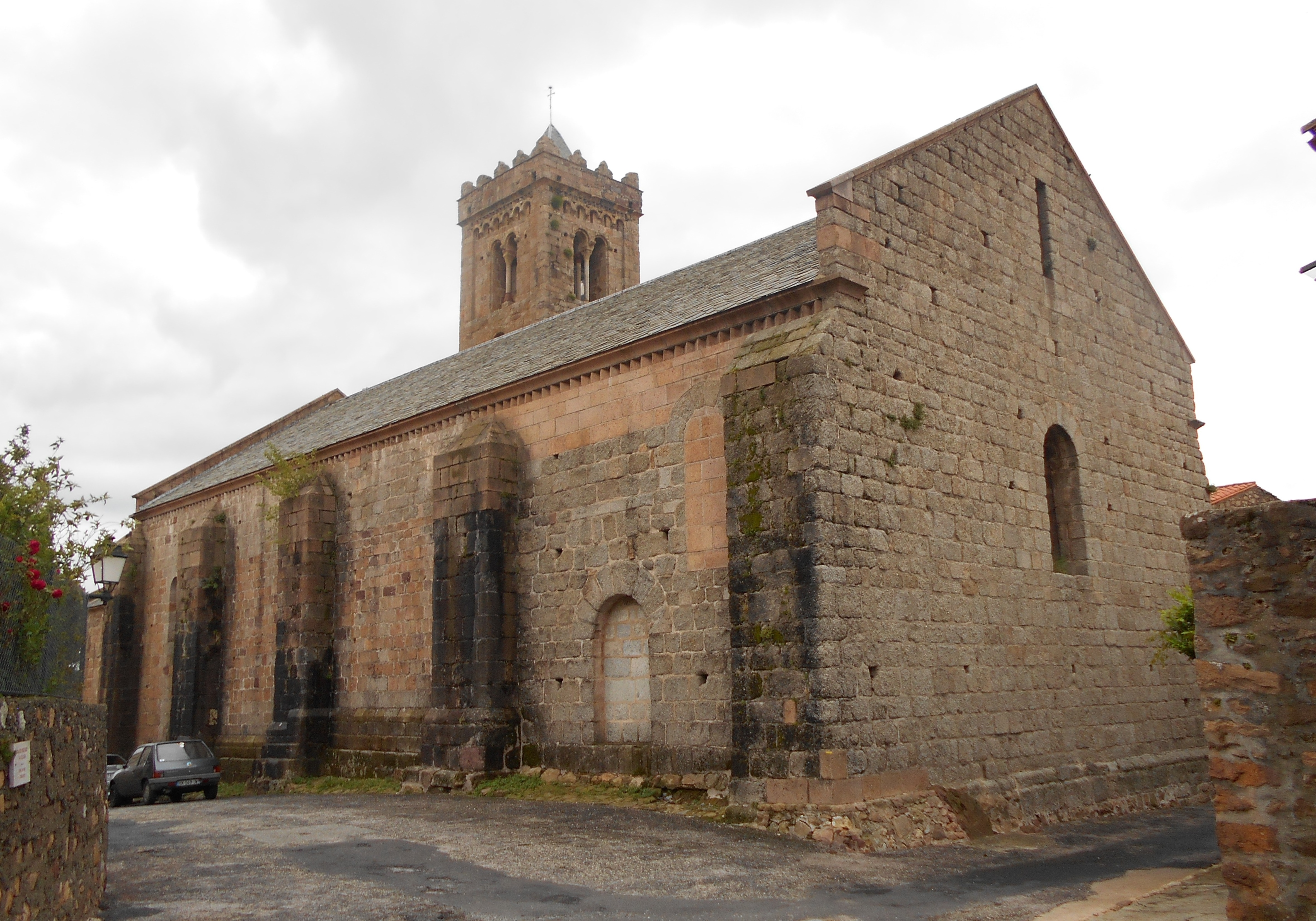 Santa Maria de Costoja des del nord-oest